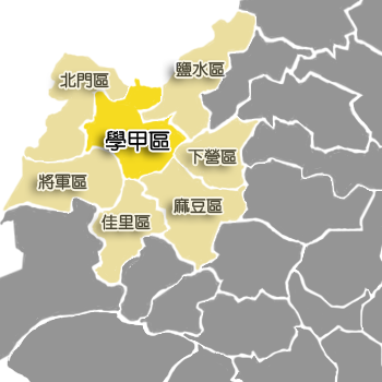 臺南市學甲區相對位置。